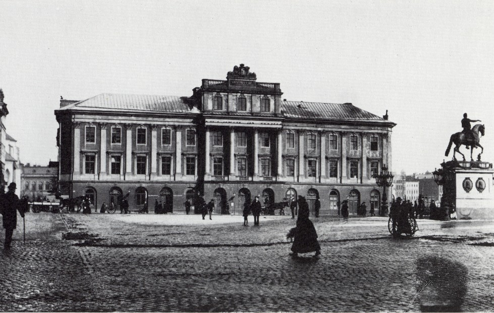 Gustav III Opera i Stockholm omkring 1880